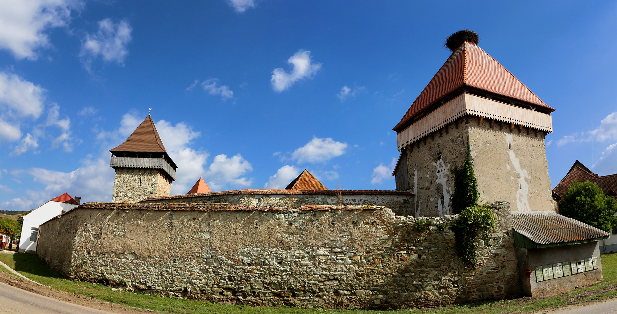 Ansamblul bisericii evanghelice fortificate 02